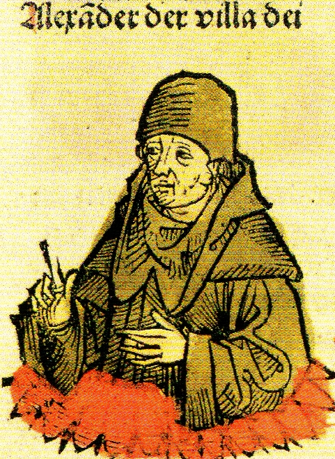 Porträt von Alexander de Villa Dei